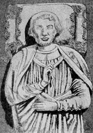 Diego López II de Haro (V señor de Vizcaya, entre 1170 y 1214). Dibujo de la estatua yacente conservada en el claustro de Sta. María la Real de Nájera (La Rioja)